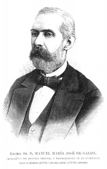 Excmo. Sr. D. Manuel María José de Galdo. Catedrático de historia natural y propagandista de la enseñanza. Nació en Madrid en 1825, falleció en esta capital el 19 del corriente.